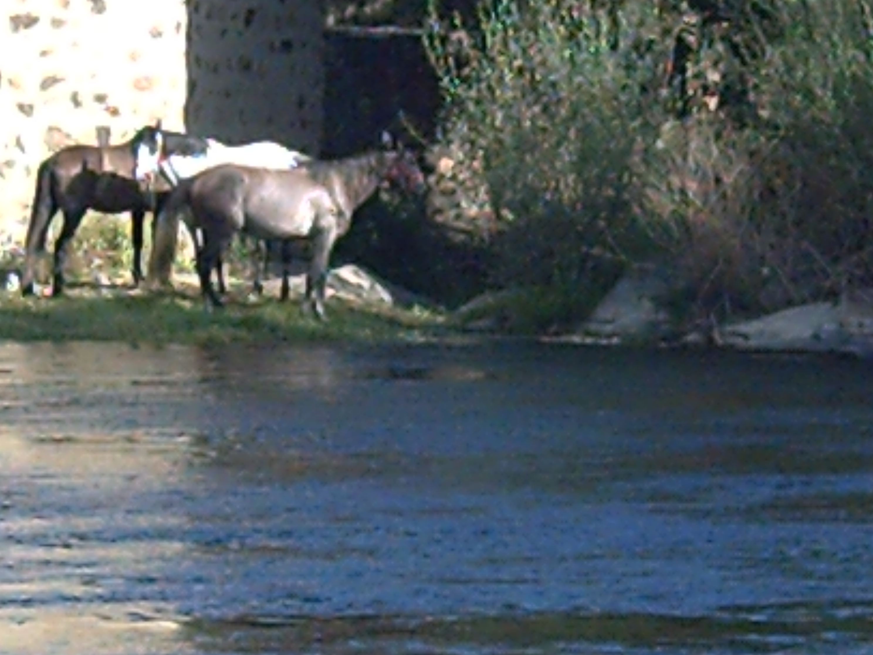 Riu Herti ena ciá e Praséncia (España)/ Rio Jerte en la ciudad de Plasencia (España)